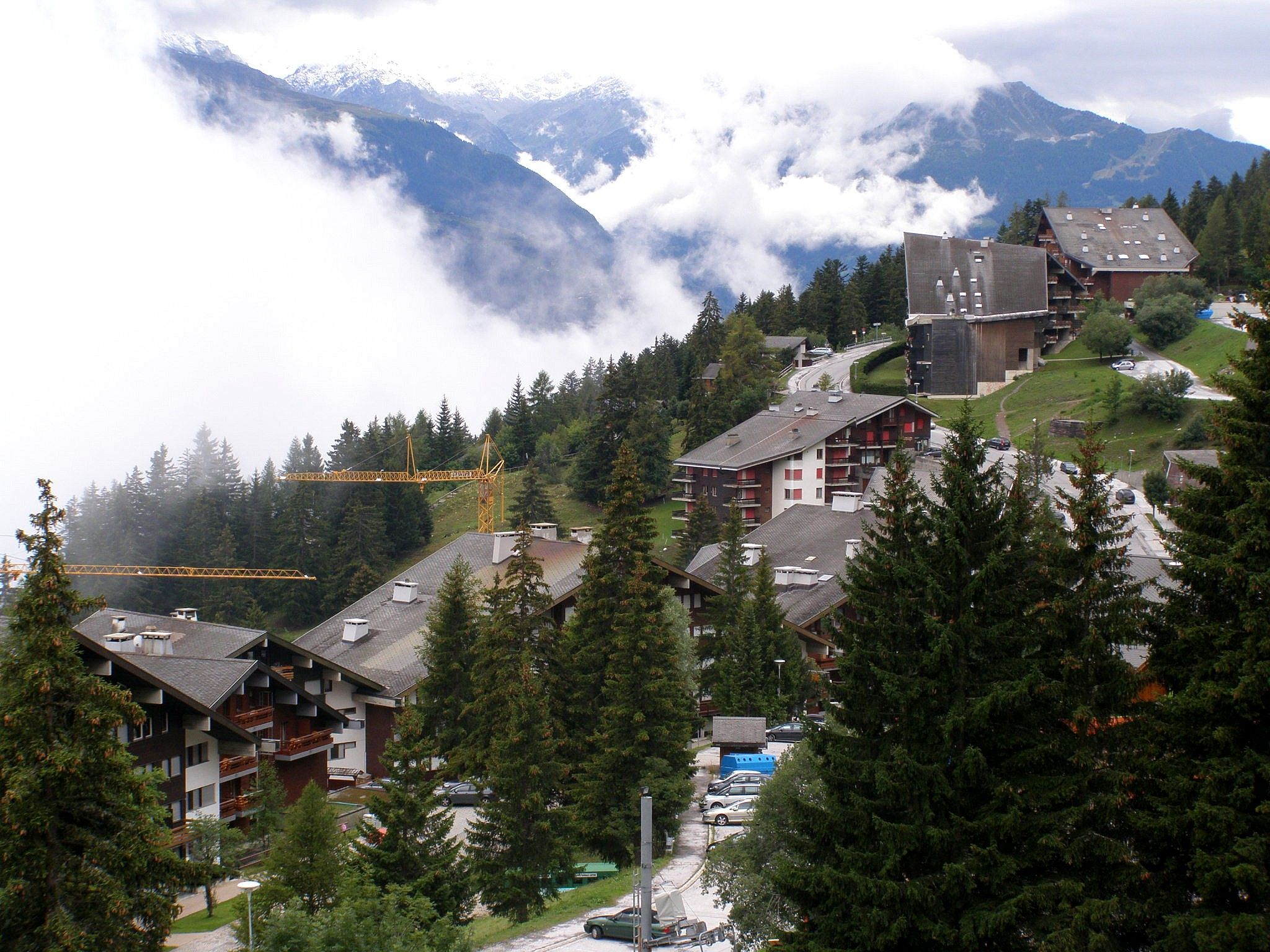 Anzère je rezort ležaci v krásnom horskom prostredí Walliských Álp